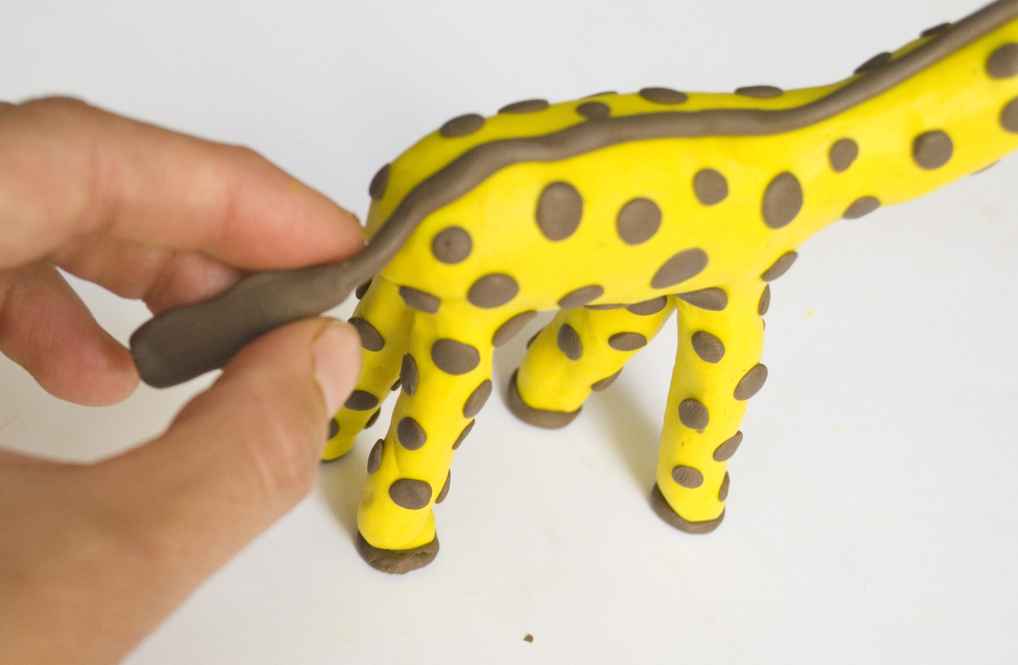 תמונה מתוך הדרכת יצירה עם פלסטלינה מאת אמנית הפלסטלינה רויטל פלקה